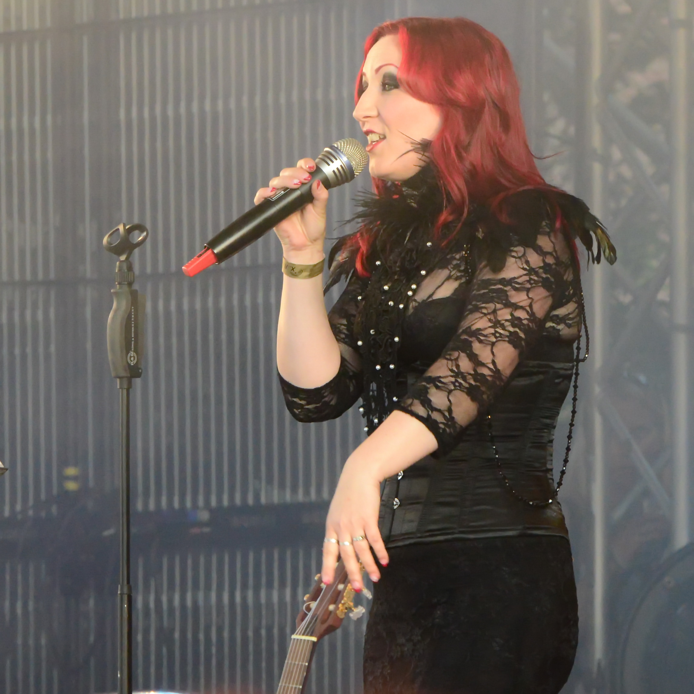 Blutengel & the "Monument"-Ensemble, Amphi festival 2014